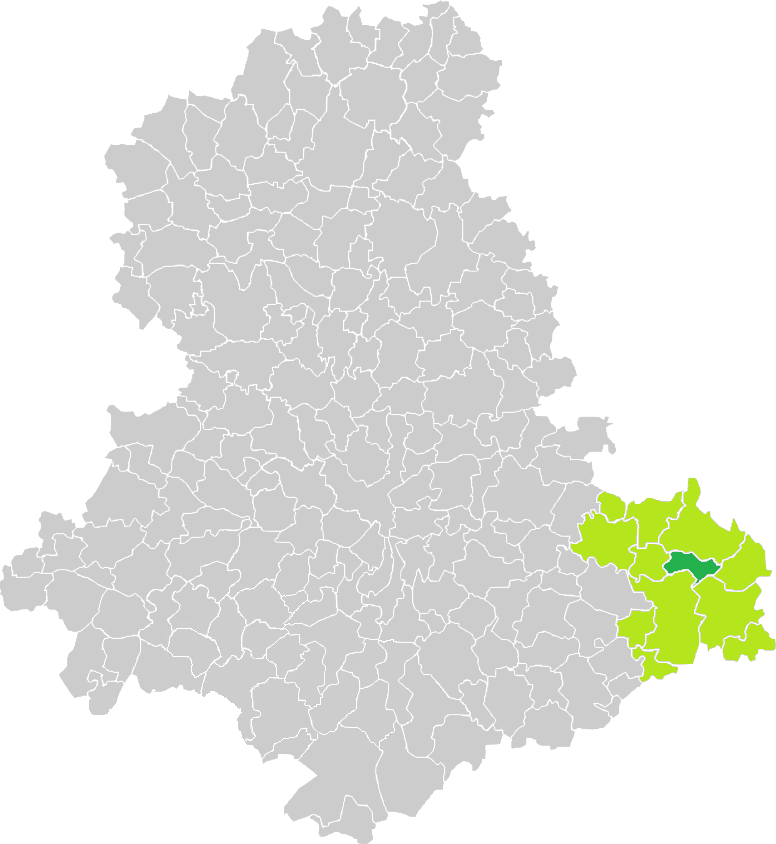 Carte de situation de la commune de Saint-Amand-le-Petit (en vert foncé) dans le votre Canton (en vert clair) sur une carte des communes de la Haute-Vienne